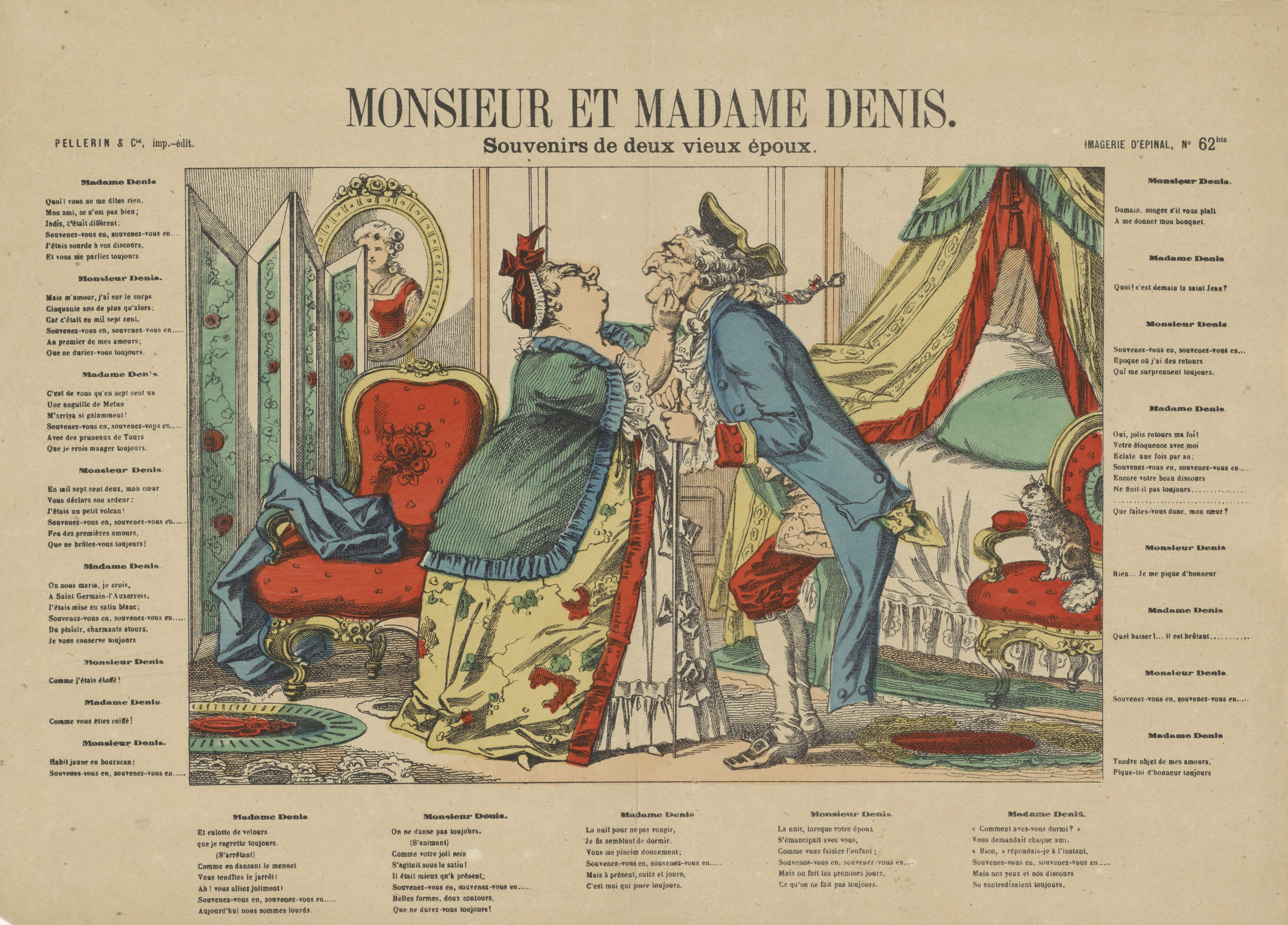 IdentificatieTitel(s): Meneer en mevrouw DenisMonsieur et madame Denis. / Souvenirs de deux vieux époux (titel op object)Objecttype: prent volksprent Objectnummer: RP-P-OB-201.099Opschriften / Merken: verzamelaarsmerk, verso, gestempeld: Lugt 2760Omschrijving: Zicht in de slaapkamer van meneer en mevrouw Denis. Het paar staat in het midden van de kamer en kijkt elkaar verliefd aan. Rechts op een stoel een kat. Rondom de afbeelding tekst in het Frans. Genummerd rechtsboven: No. 62bis.VervaardigingVervaardiger: uitgever: Pellerin & Cie. (vermeld op object)prentmaker: anoniemPlaats vervaardiging: uitgever: Épinalprentmaker: EuropaDatering: ca. 1791 - ca. 1900Fysieke kenmerken: Lithografie gekleurd in geel, blauw, groen en rood; tekst in boekdrukMateriaal: papier Techniek: lithografie (techniek) / kleuren / boekdrukAfmetingen: blad: h 294 mm × b 399 mmOnderwerpWat: bedroom(lovers) caressing each otherVerwerving en rechtenCredit line: Schenking van de heer F.G. Waller, AmsterdamVerwerving: schenking 1923Copyright: Publiek domein